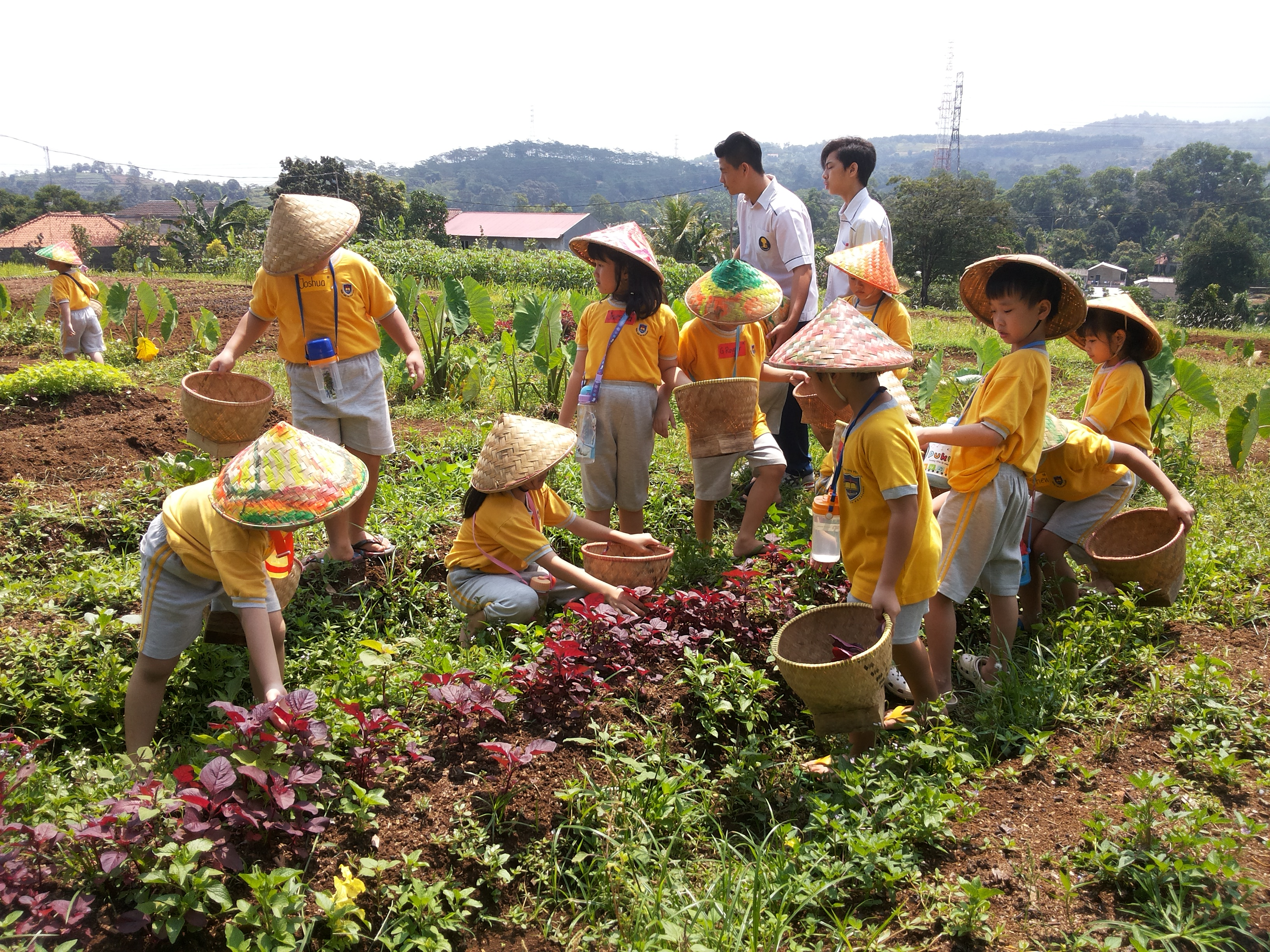 Sebuah kegiatan wisata edukasi perkebunan di Bogor, Indonesia. Diambil dari Garuda pada bulan Agustus 2017 dan dilepaskan ke domain publik.